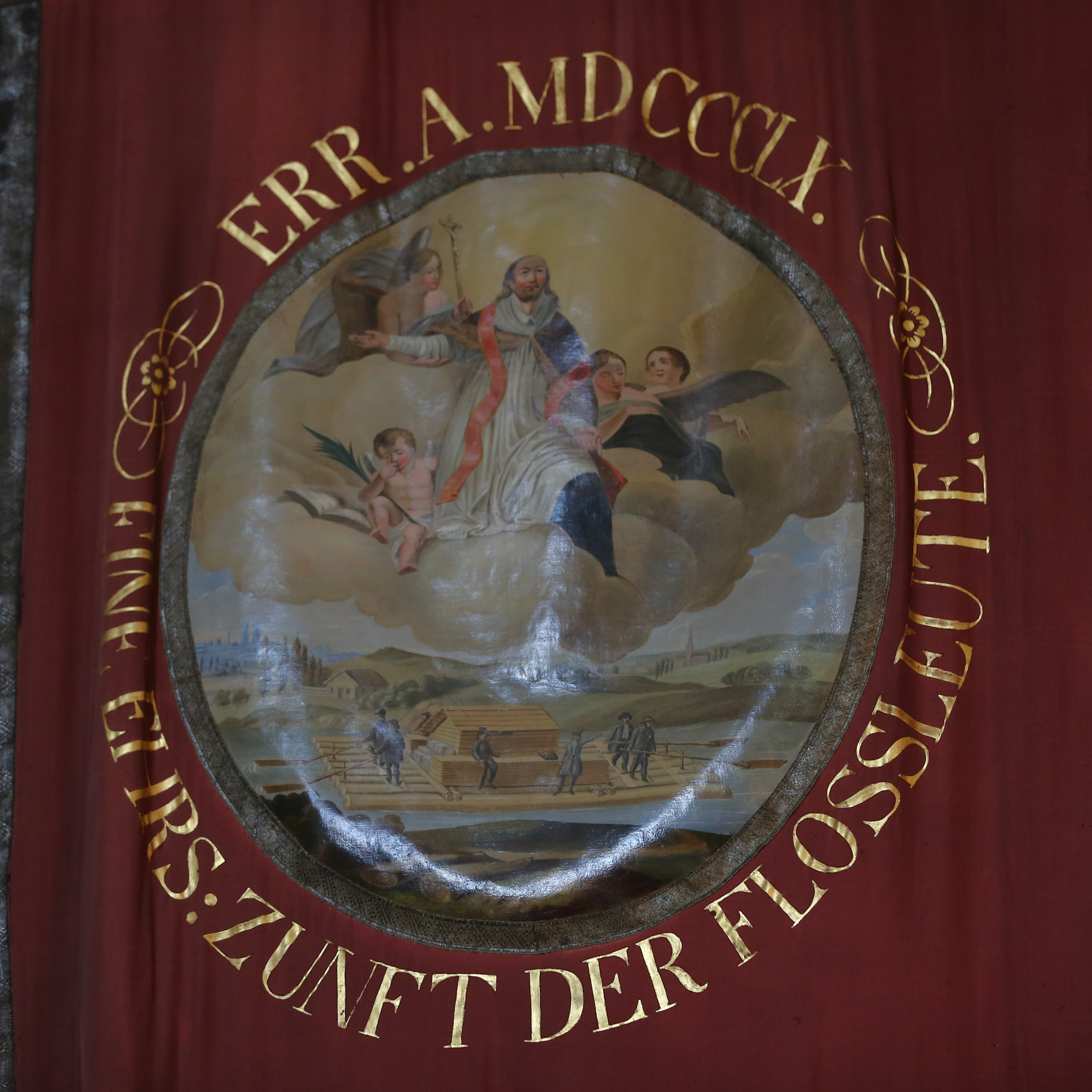 St. Maria Thalkirchen Zunftfahne der Isarflößer von 1860